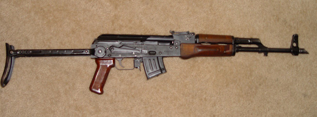 AKMS wz. 1981